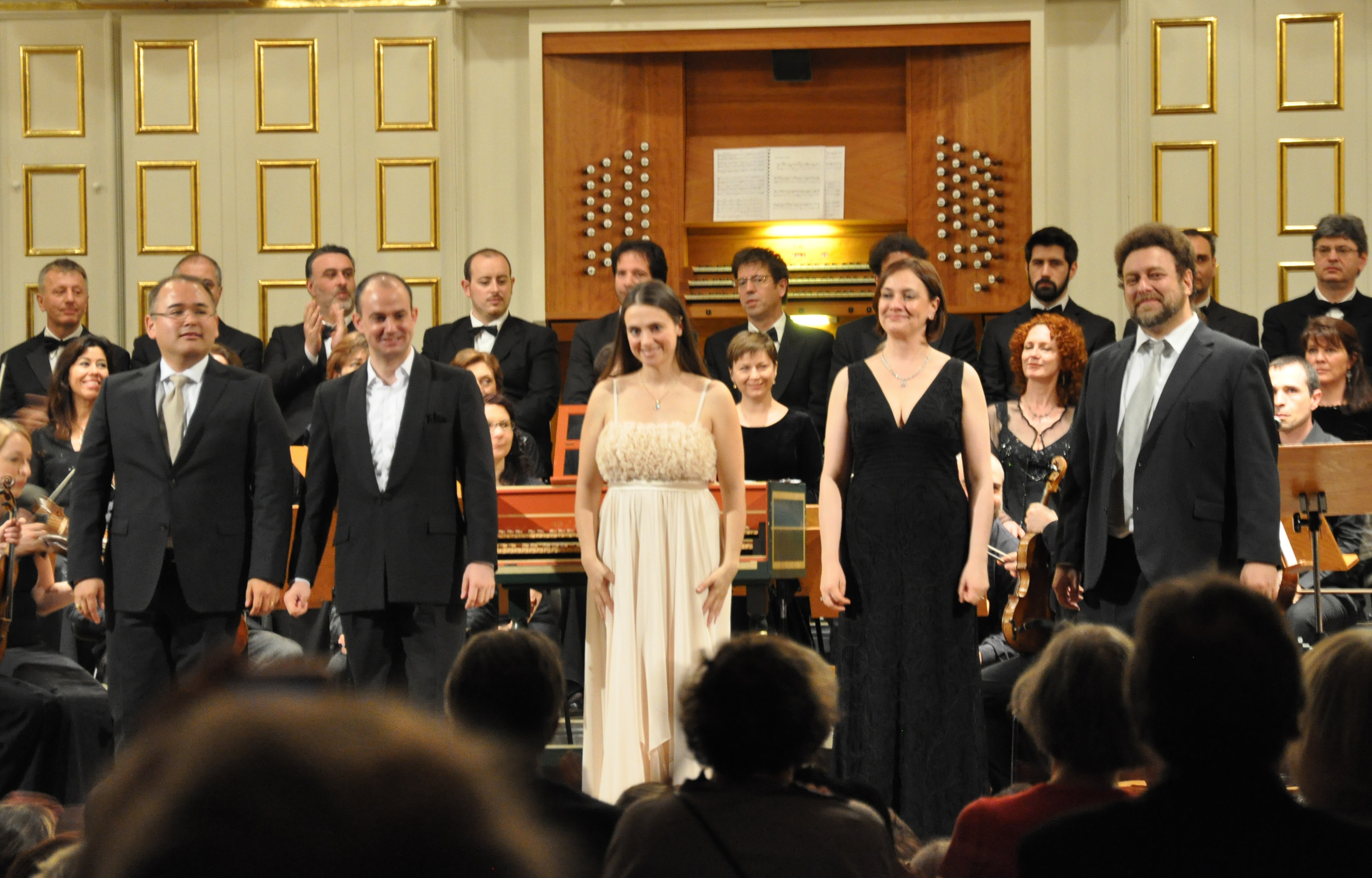 Vocal soloists of Isacco figura di Redentore by Jomelli, Mozarteum, Salzburger Pfingstfestspiele 2013 From left to right: Javier Camarena, Abramo (tenor) Franco Fagioli, Isacco (countertenor) Nuria Rial, Angelo (soprano) Roberta Invernizzi, Sara (soprano) Carlo Lepore, Gamari (bass)